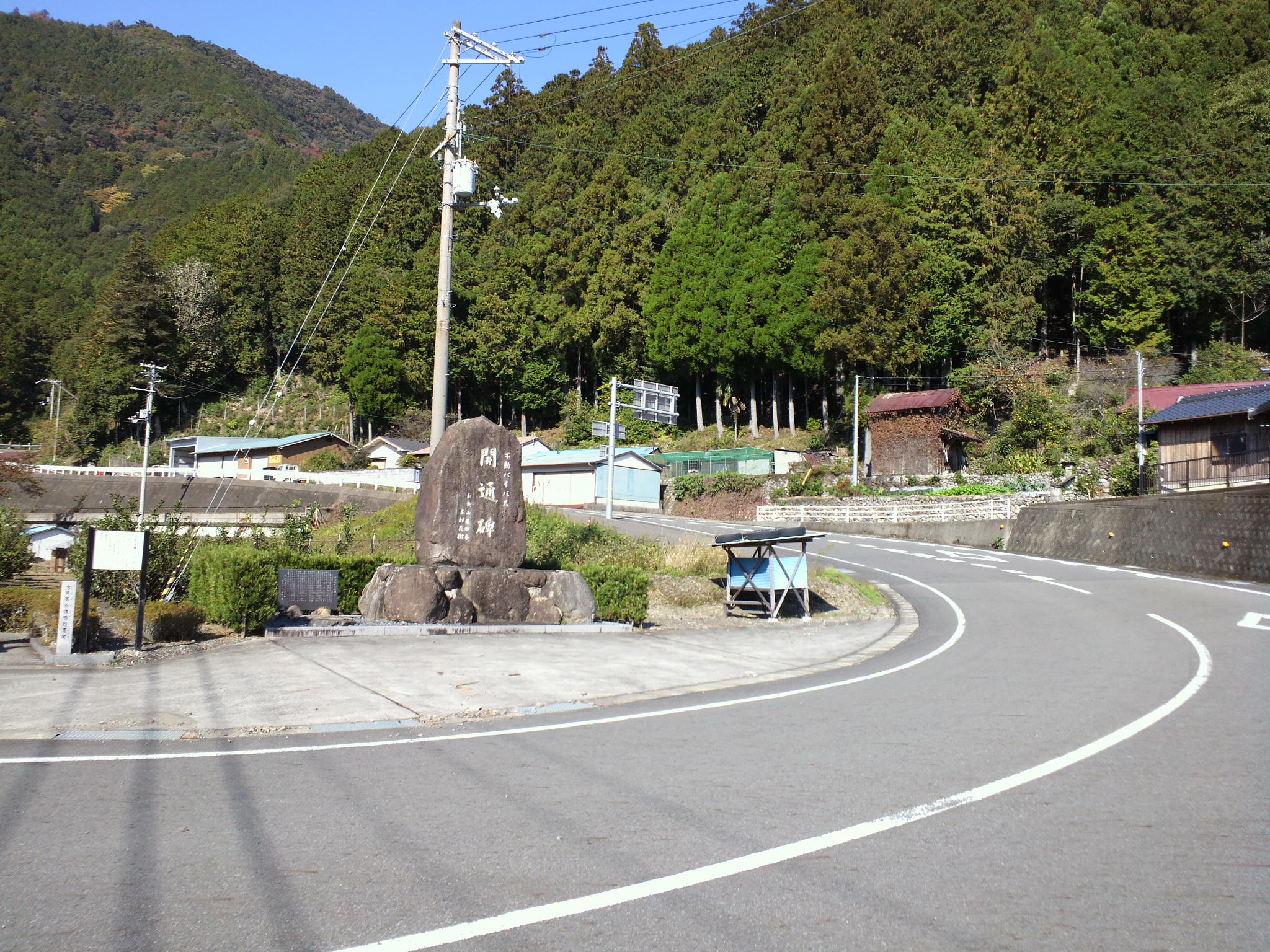 不動バイパス開通碑（和歌山県北山村七色） 撮影者：Kansai explorer